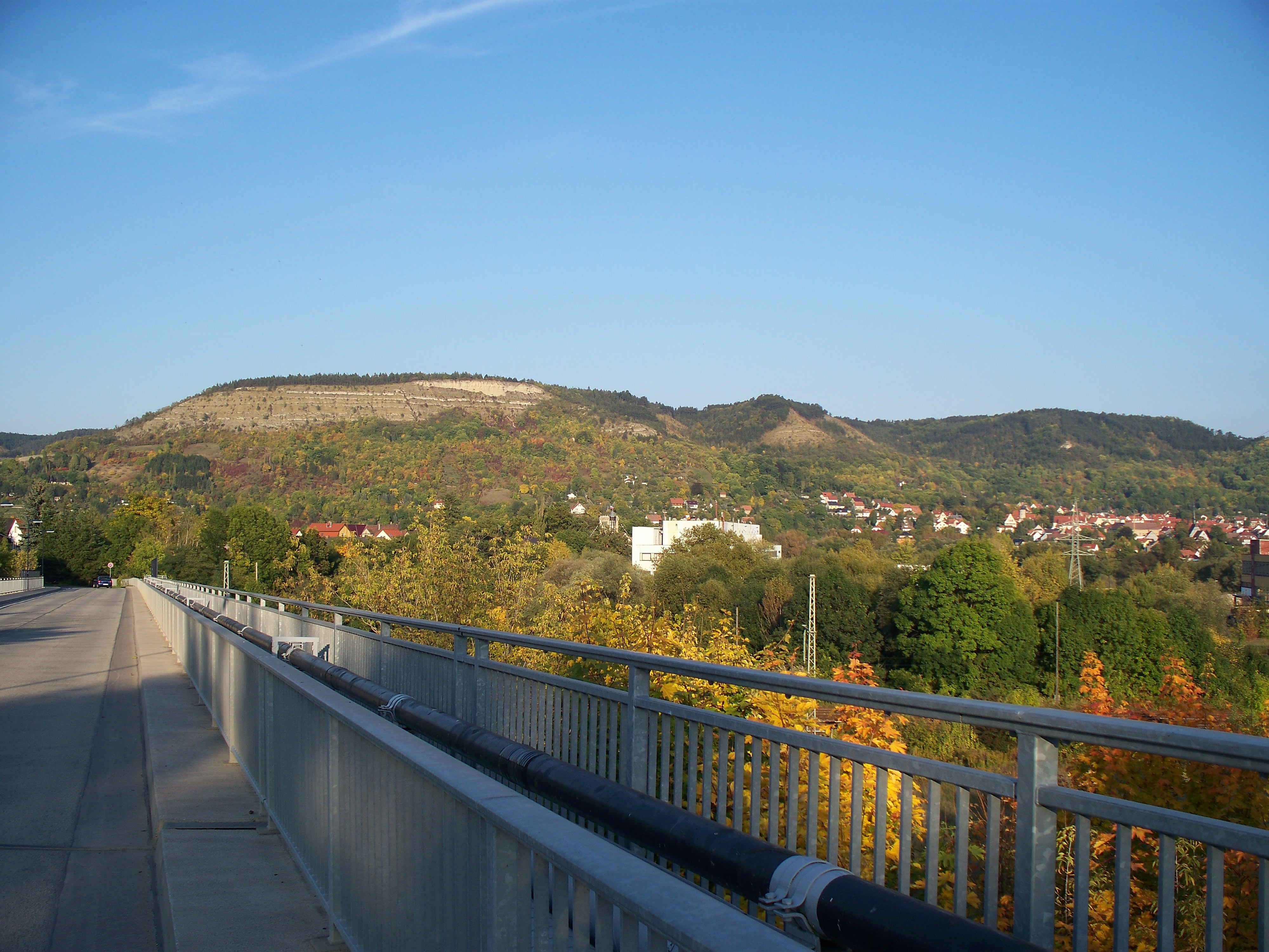 Eisenbahnbrücke Burgau, Johannisberg im Hintergrund